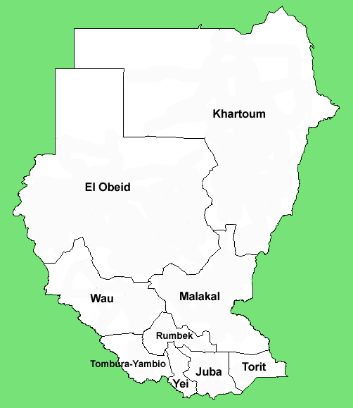 Mappa delle diocesi del Sudan. Lavoro personale eseguito a partire da questo file in Commons. Licensing Categoria:Chiesa cattolica in Sudan